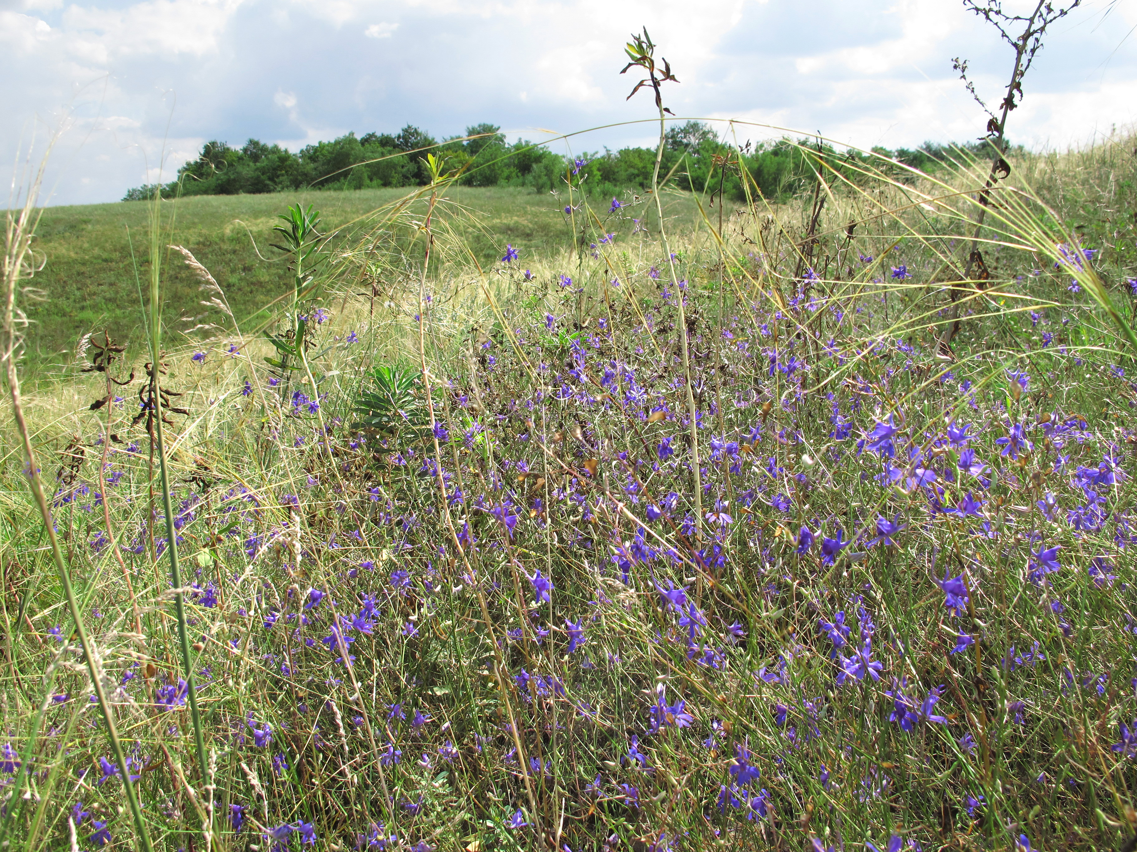 Схил балки із ковилою волосистою і сокирками польовими. Ботанічний заказник "Балка Бубликова"